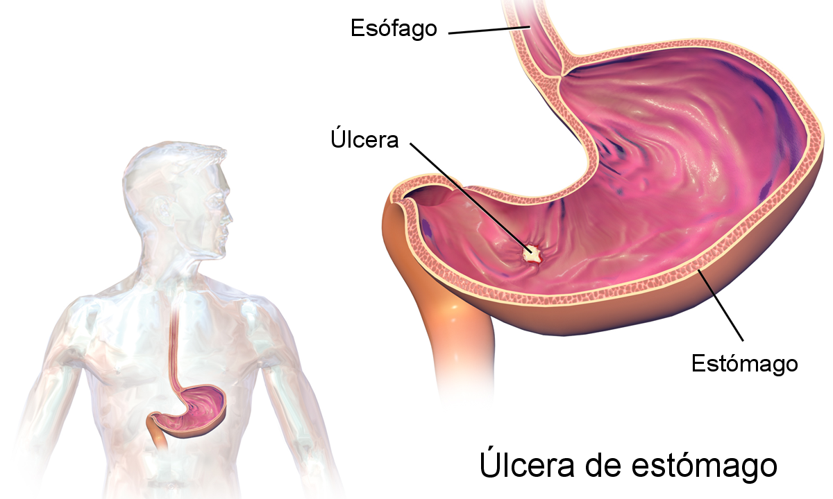 Esquema en el que se representa un estómago humano afectado por úlcera de estómago